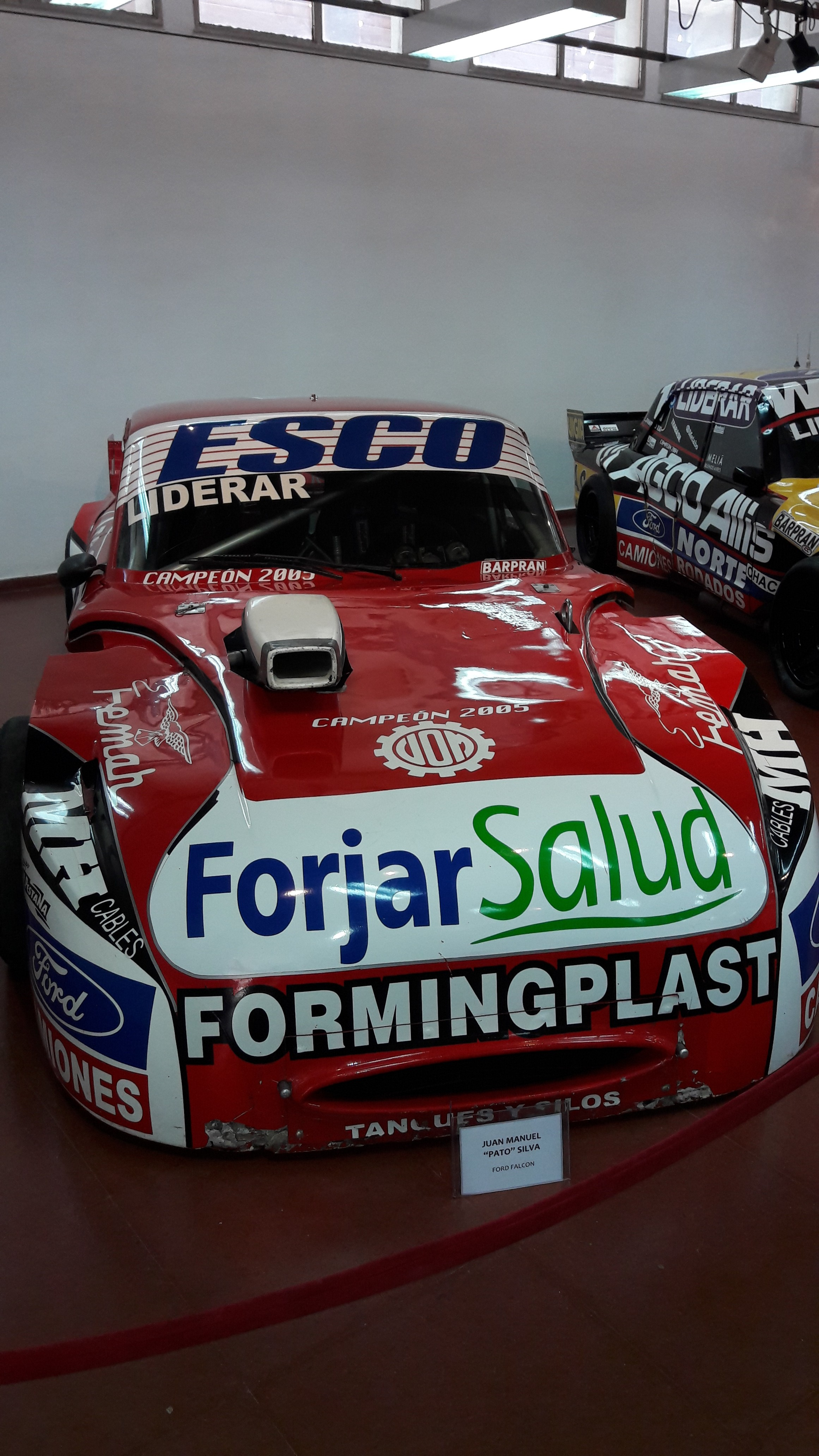 Ford Falcon - Juan Manuel Silva. Expo Autos, Museo de Bellas Artes de Luján.